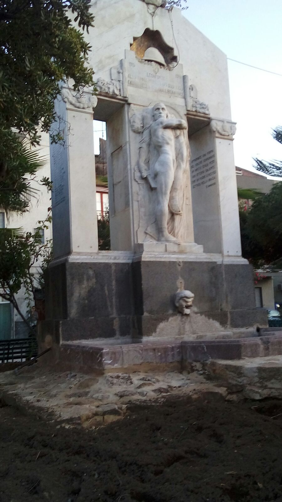 in realtà si tratta del monumento ai caduti di piazza quattro novembre